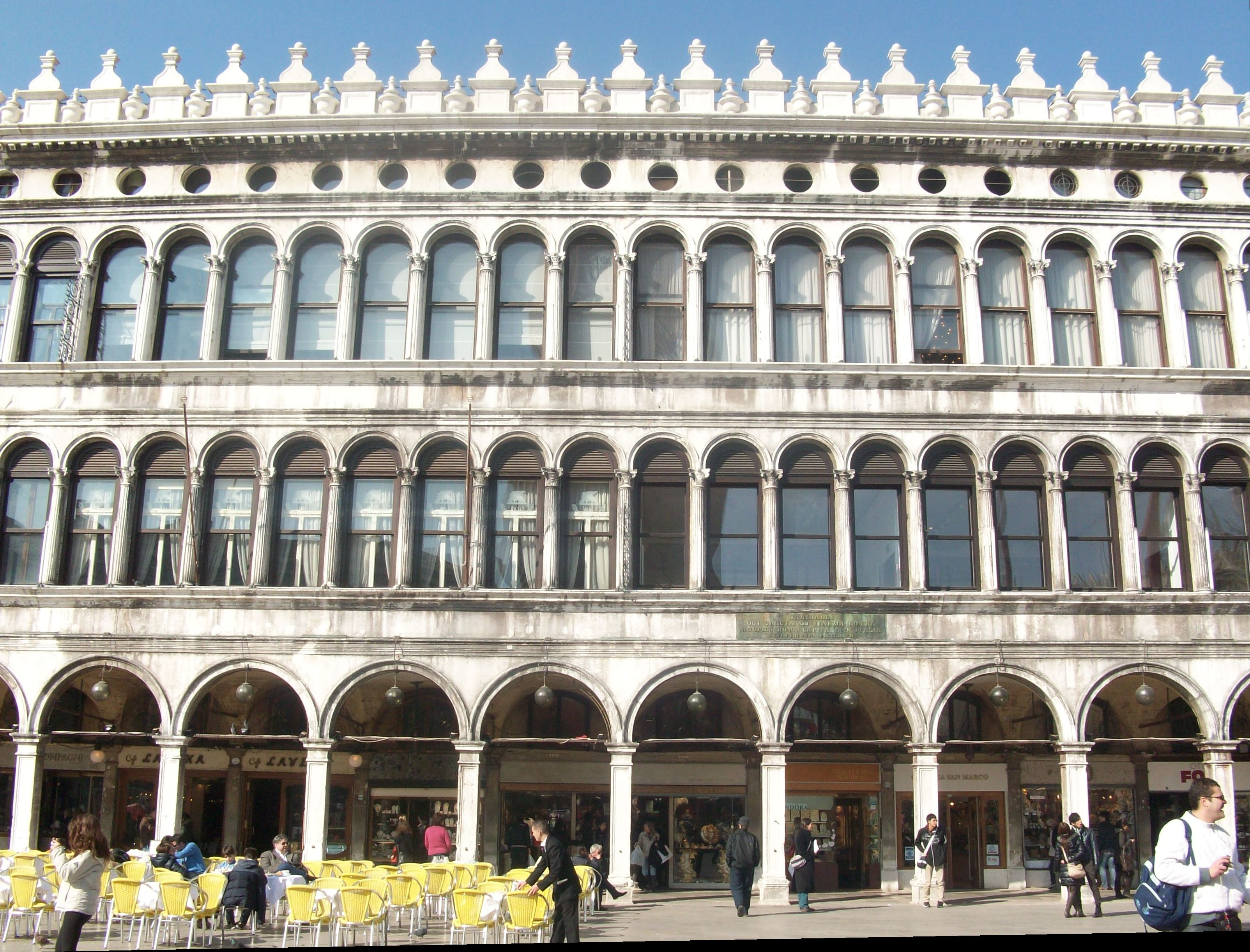 Venecia, Italia